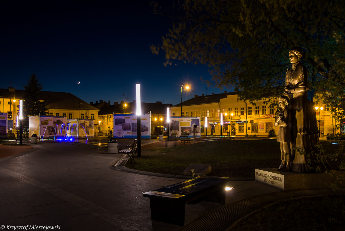 Plac Marii Konopnickiej